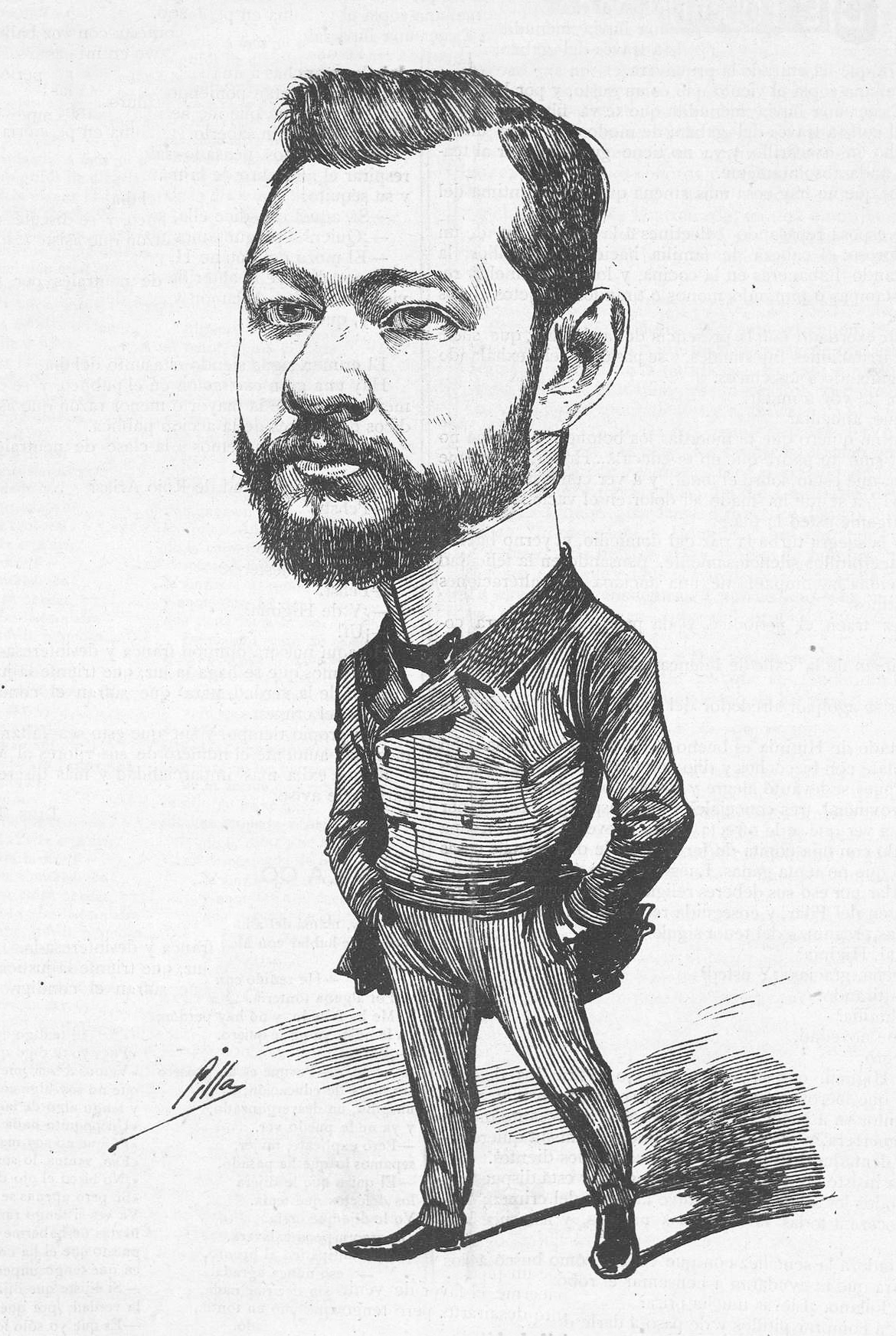 Joaquín G. Gómez-Soldado.